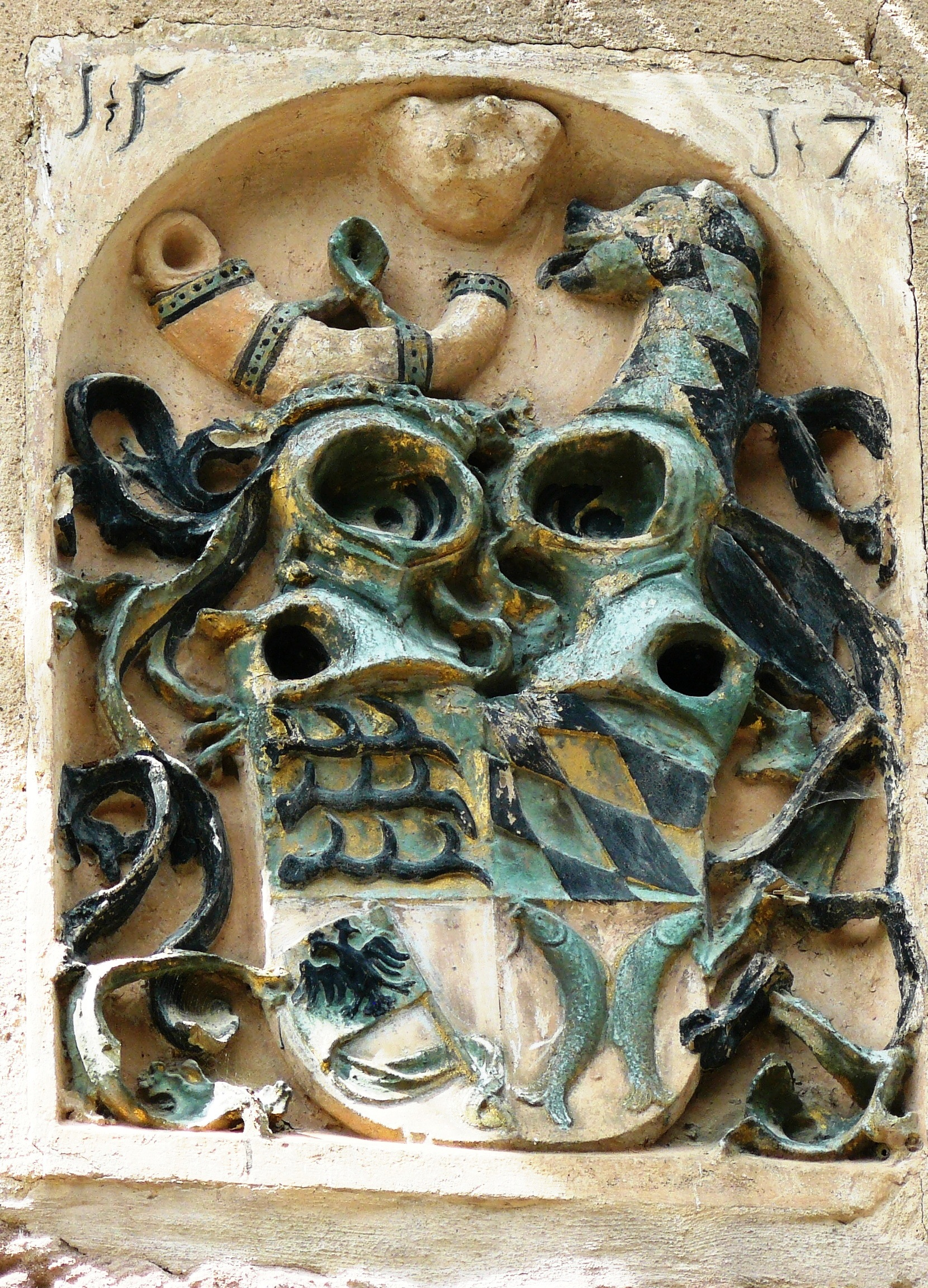 Écusson se trouvant sur la façade de la mairie datant de 1517 remarquablement bien conservé.